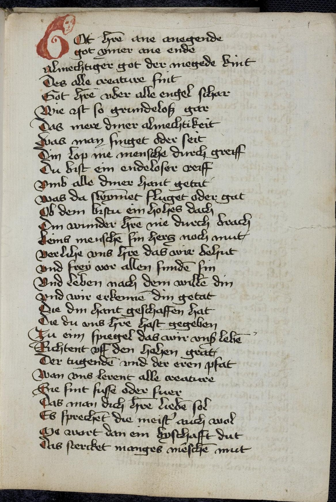 Codex Palatinus germanicus 400, "[Ulrich] Boner: Edelstein", Blatt 1r der Handschrift.